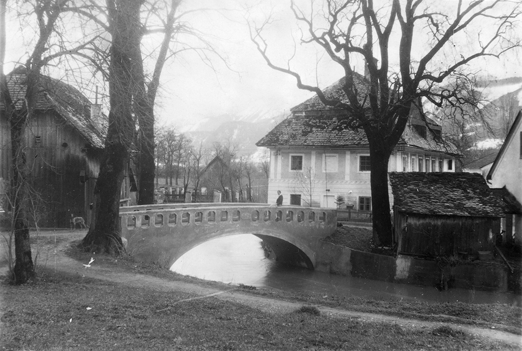 Sensenwerk Blumau, Blick auf Schmiedhaus und Brücke